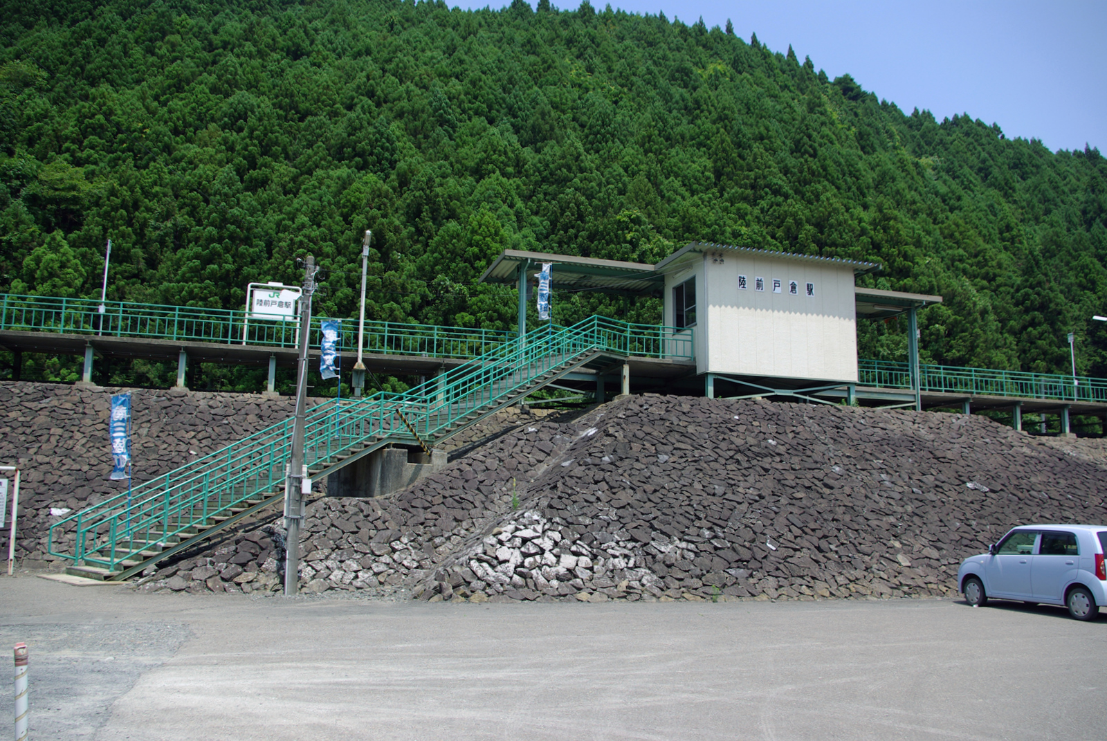 JR気仙沼線陸前戸倉駅